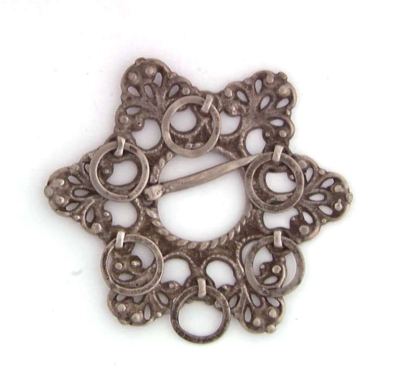 Sporesølje i sølv med hengende ringer, fra Øystre Slidre. Foto: Anne-Lise Reinsfelt / Norsk Folkemuseum, NF.1994-0099.